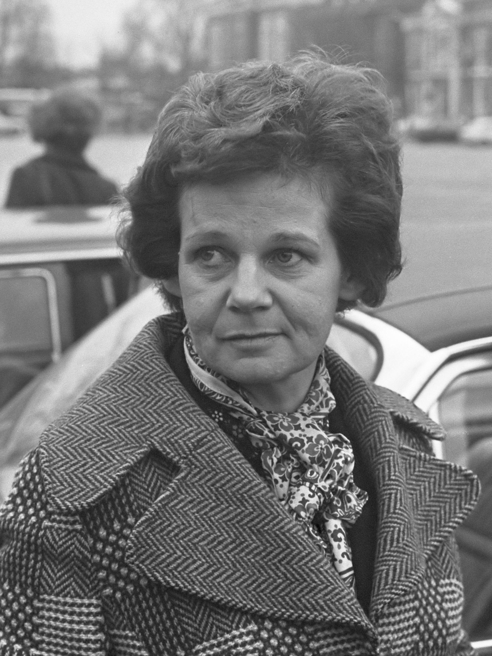 Euthanasie-proces begonnen tegen mevrouw Postma van Boven in Leeuwarden, mevrouw Postma 7 februari 1973